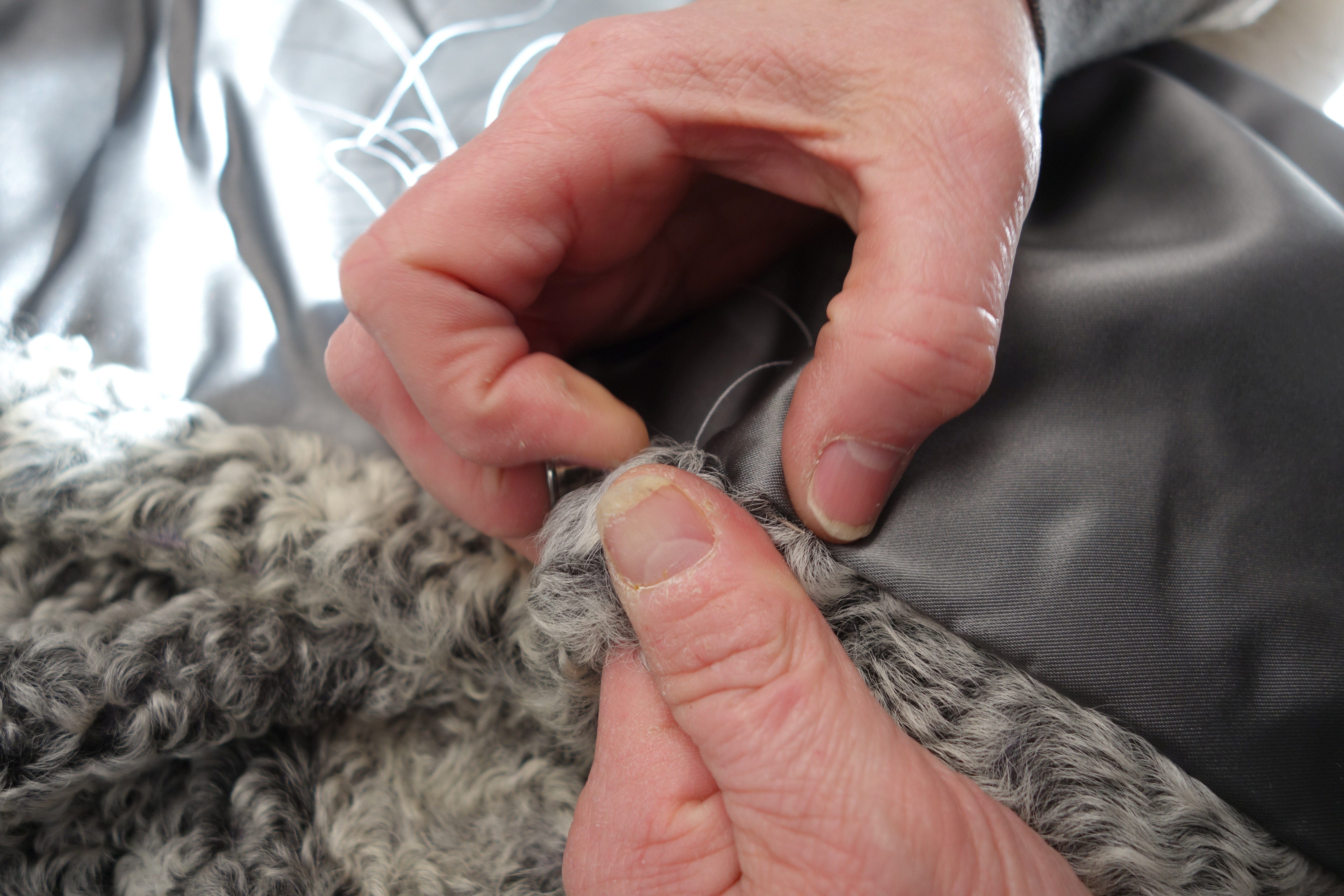 Pelz-Verzugsstich. Gesehen im Atelier der Firma Halfmann Pelzmanufaktur GmbH., Düsseldorf-Oberkassel.